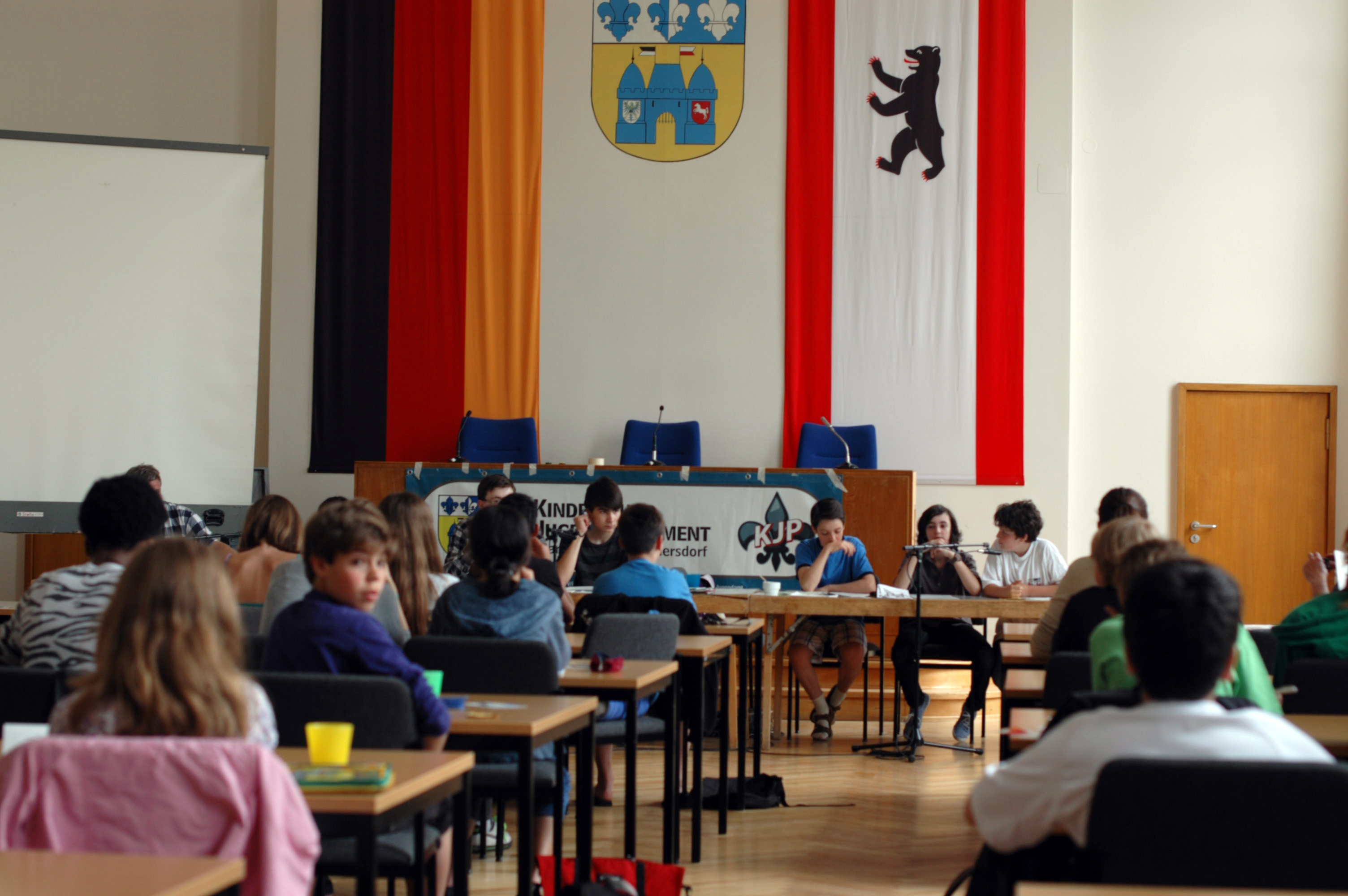 Kinder- und Jugendparlament Berlin Charlottenburg-Wilmersdorf öffentliche Sitzung Vorstellung der Funktionsweise der Wikipedia & des Wiki2go-Sticks